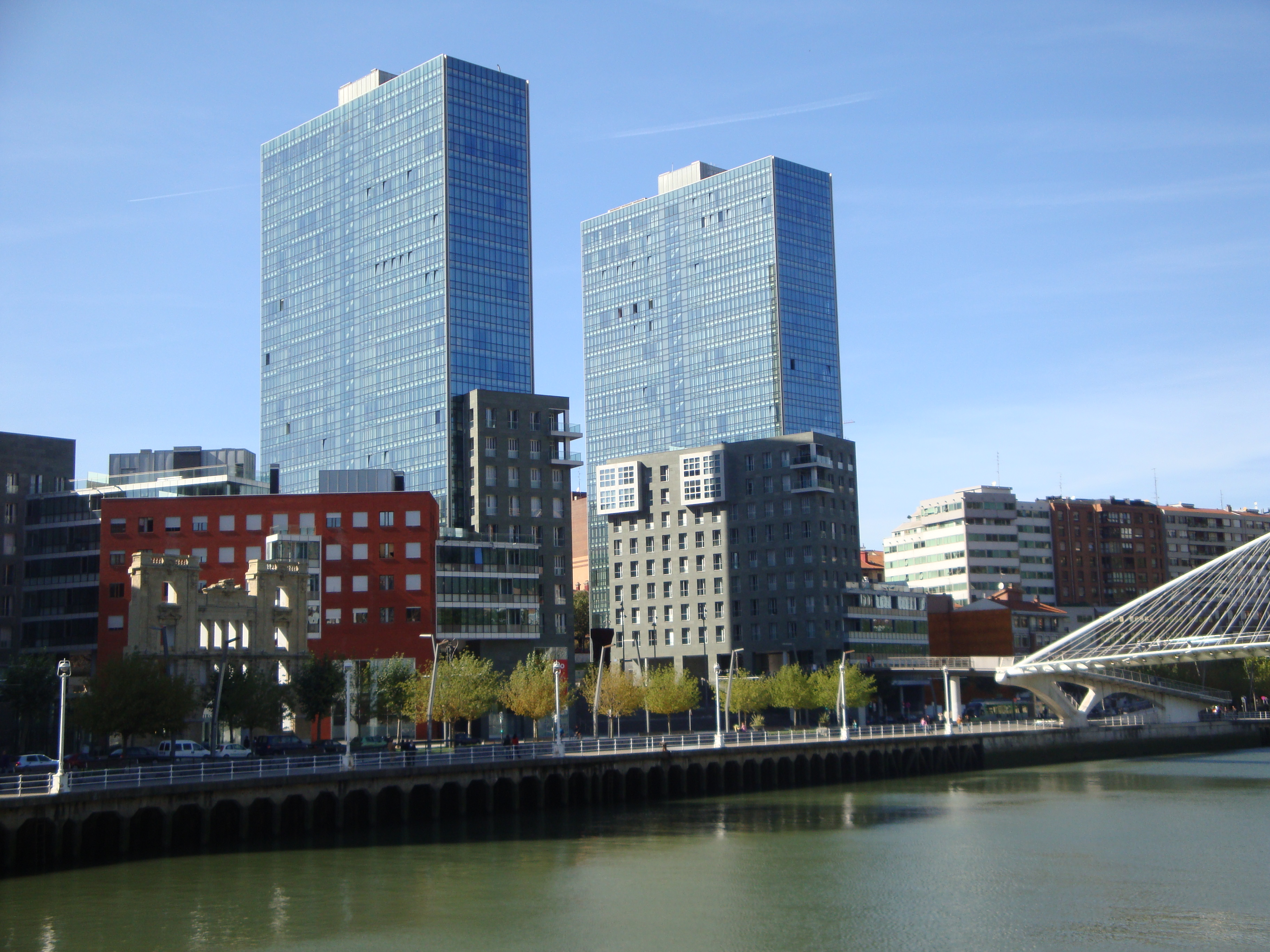 Torres gemelas de oficina de Uribitarte (Bilbao).